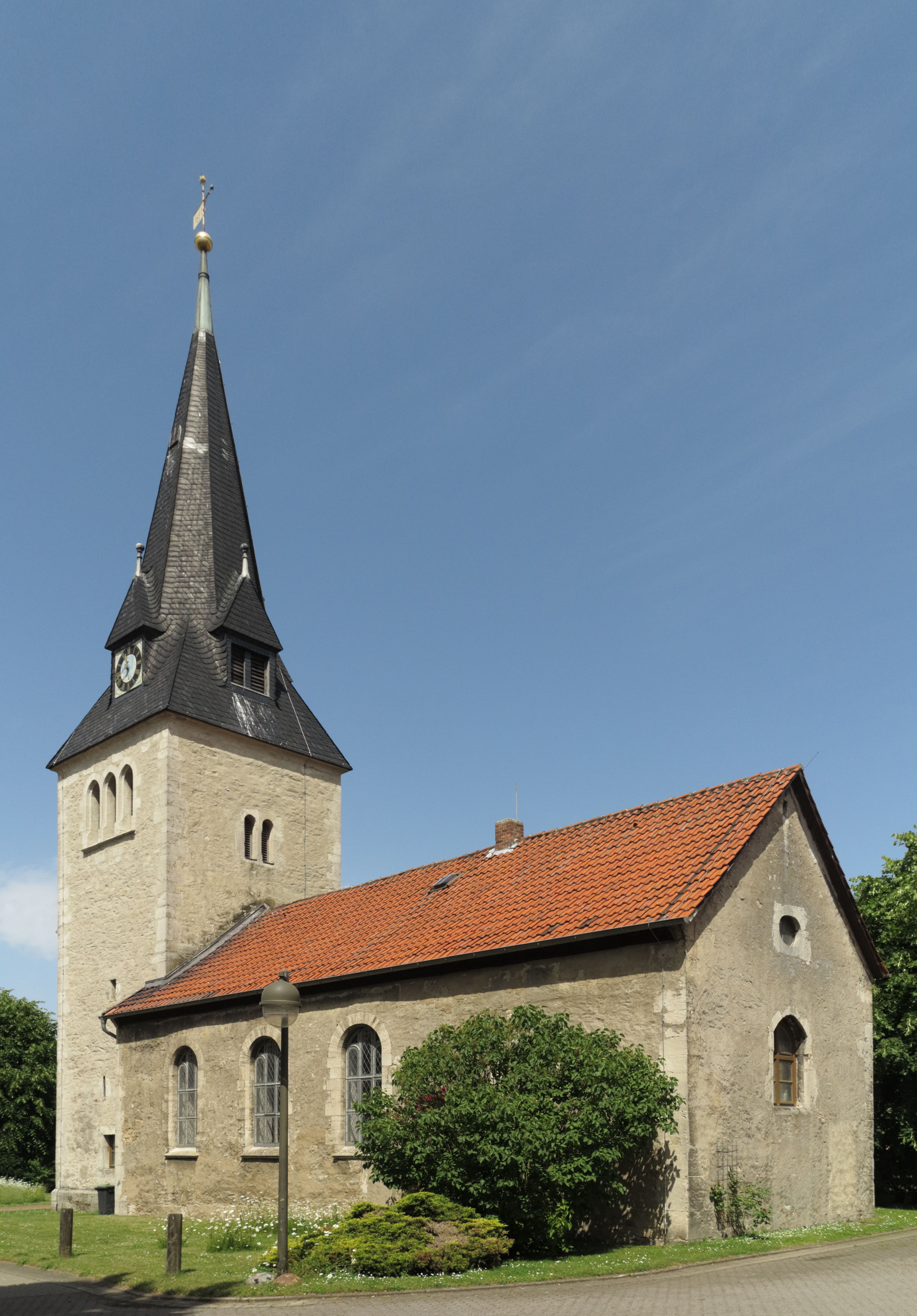 Die Kirche von Schliestedt